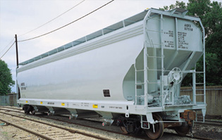 Tolvas con cubierta